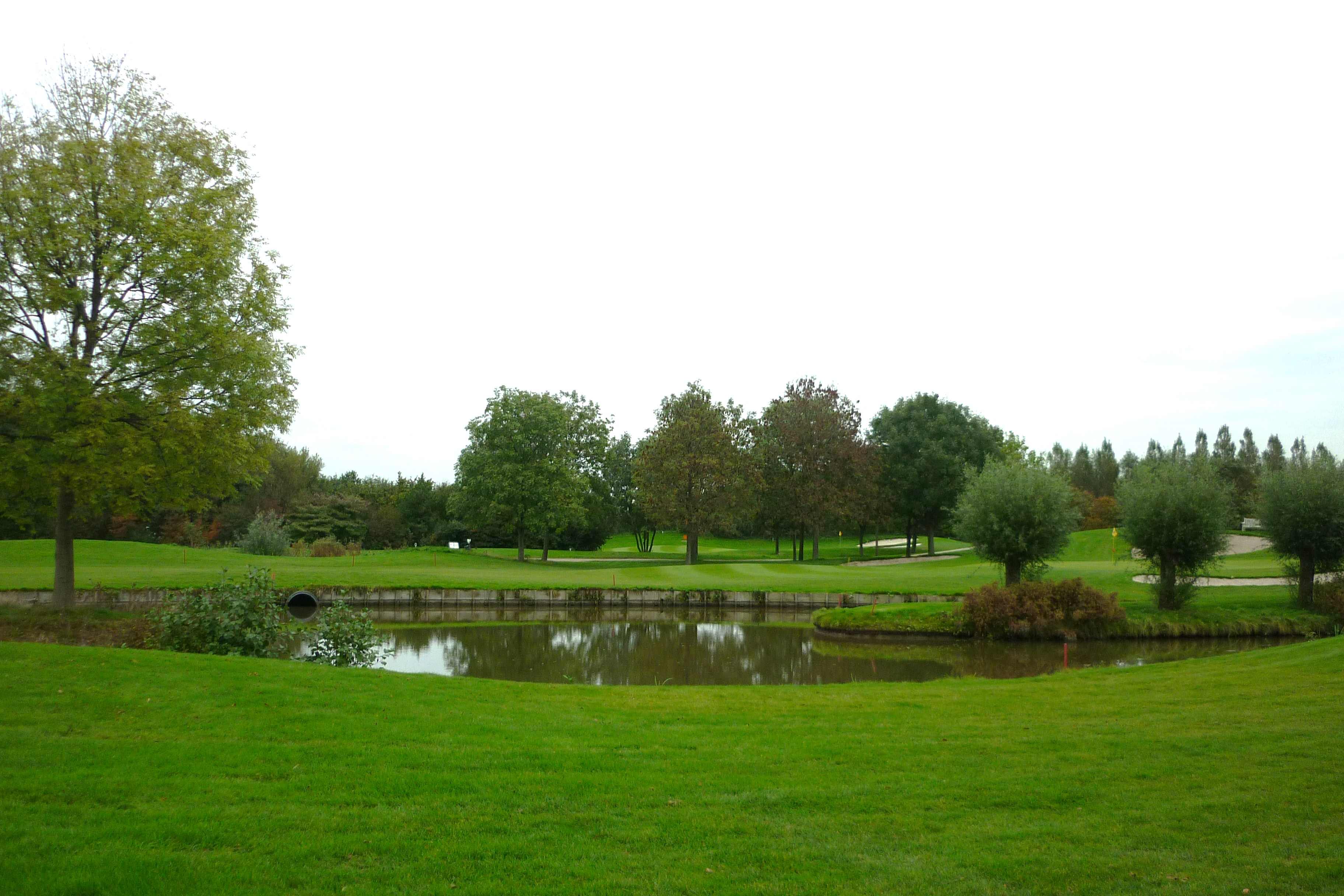 Rijswijkse Golf, nieuwe waterpartij 2010